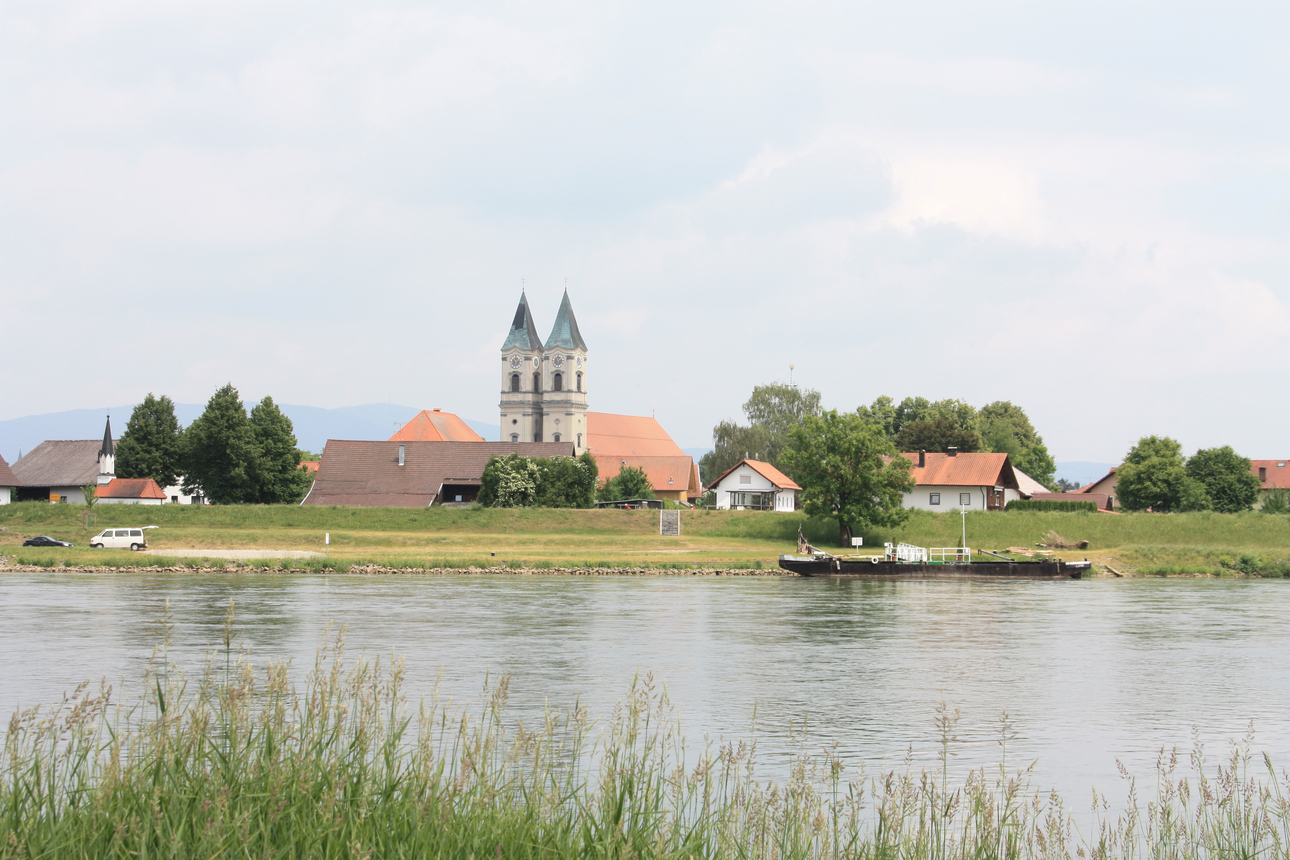 Niederalteich von Westen